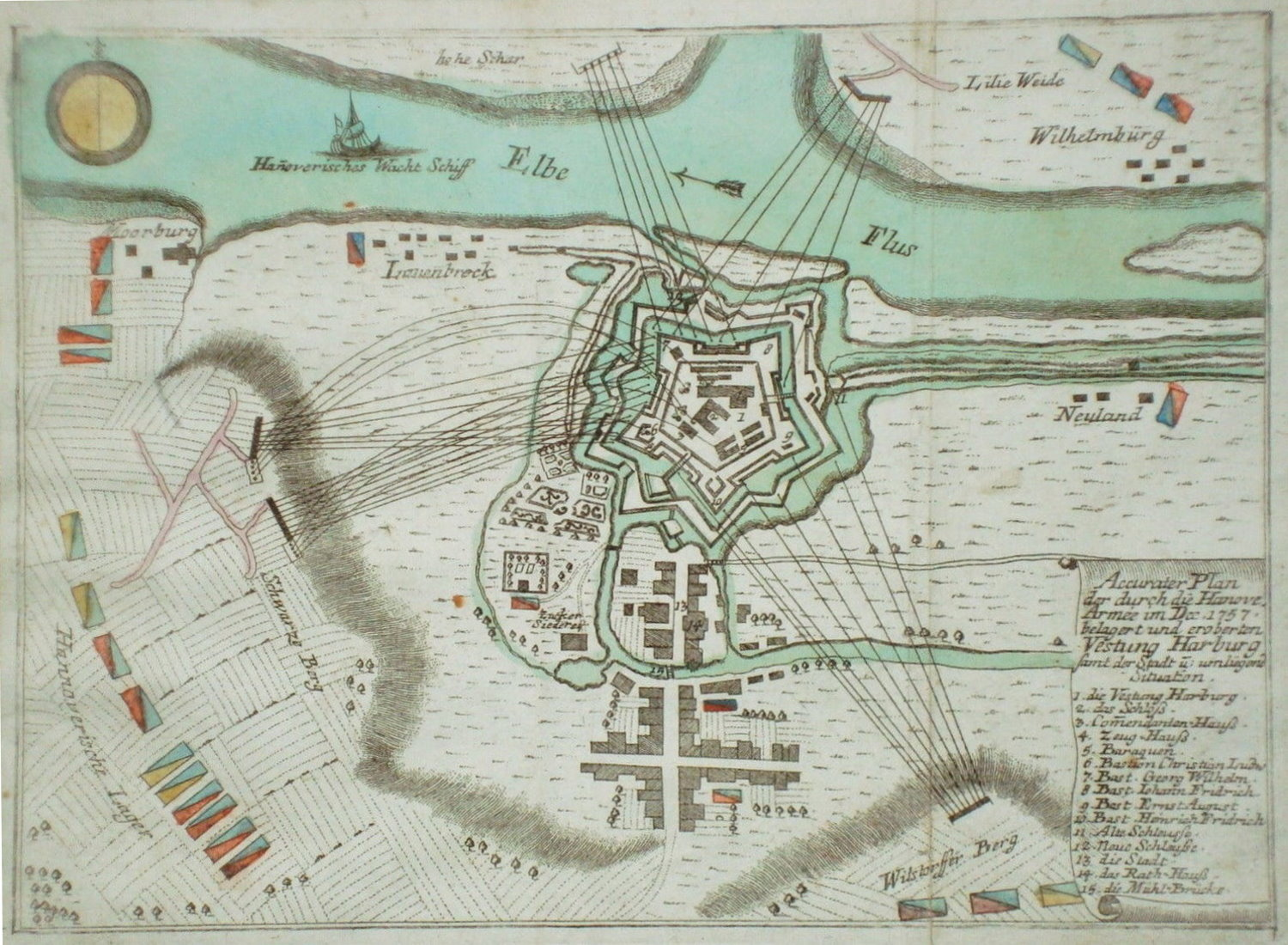 Belagerung der Festung Harburg durch die Hanoversche Armee im Dezember 1757